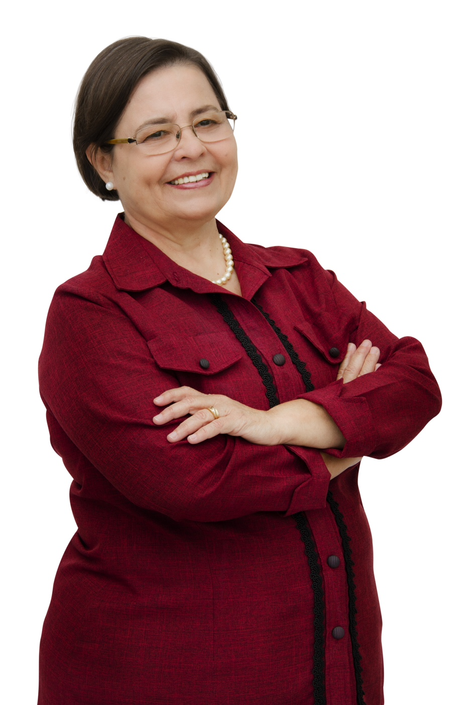 Foto de Divulgação